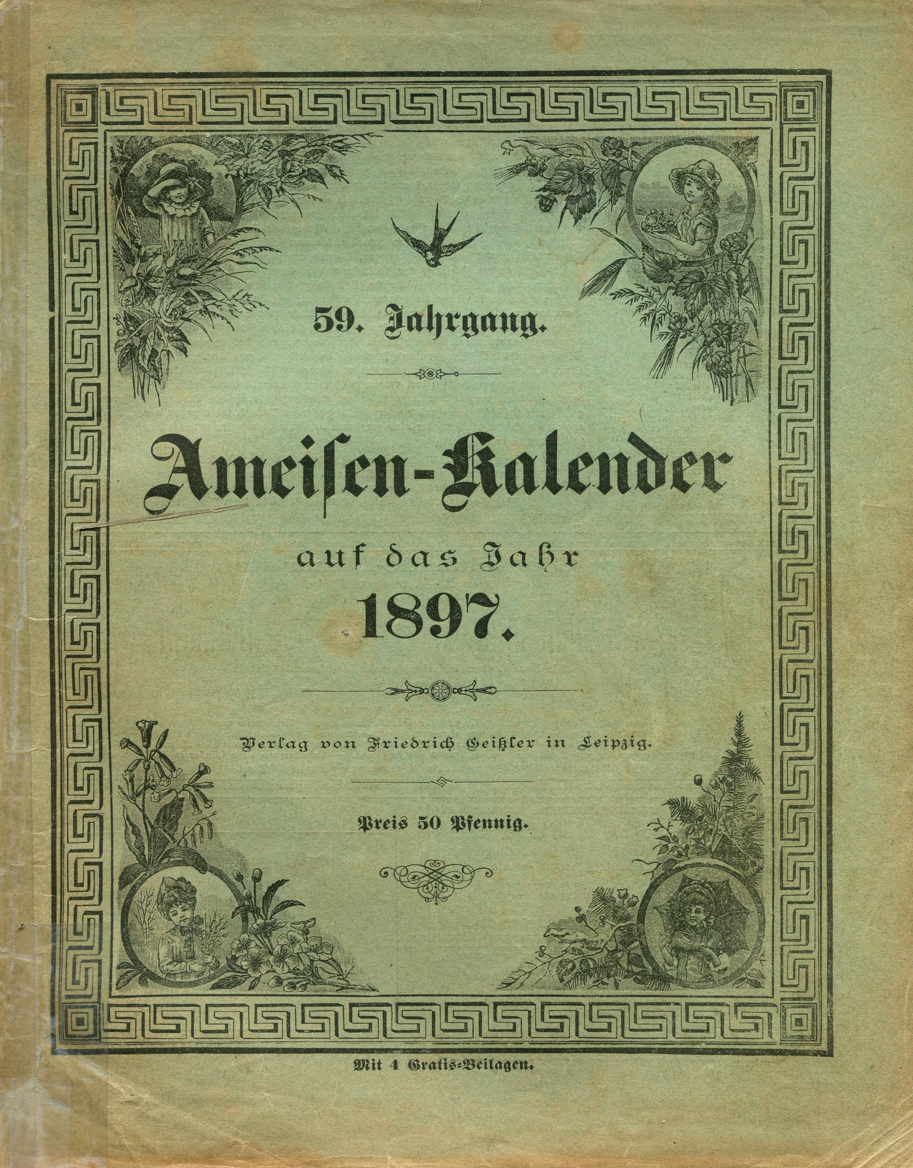 Ameisen-Kalender